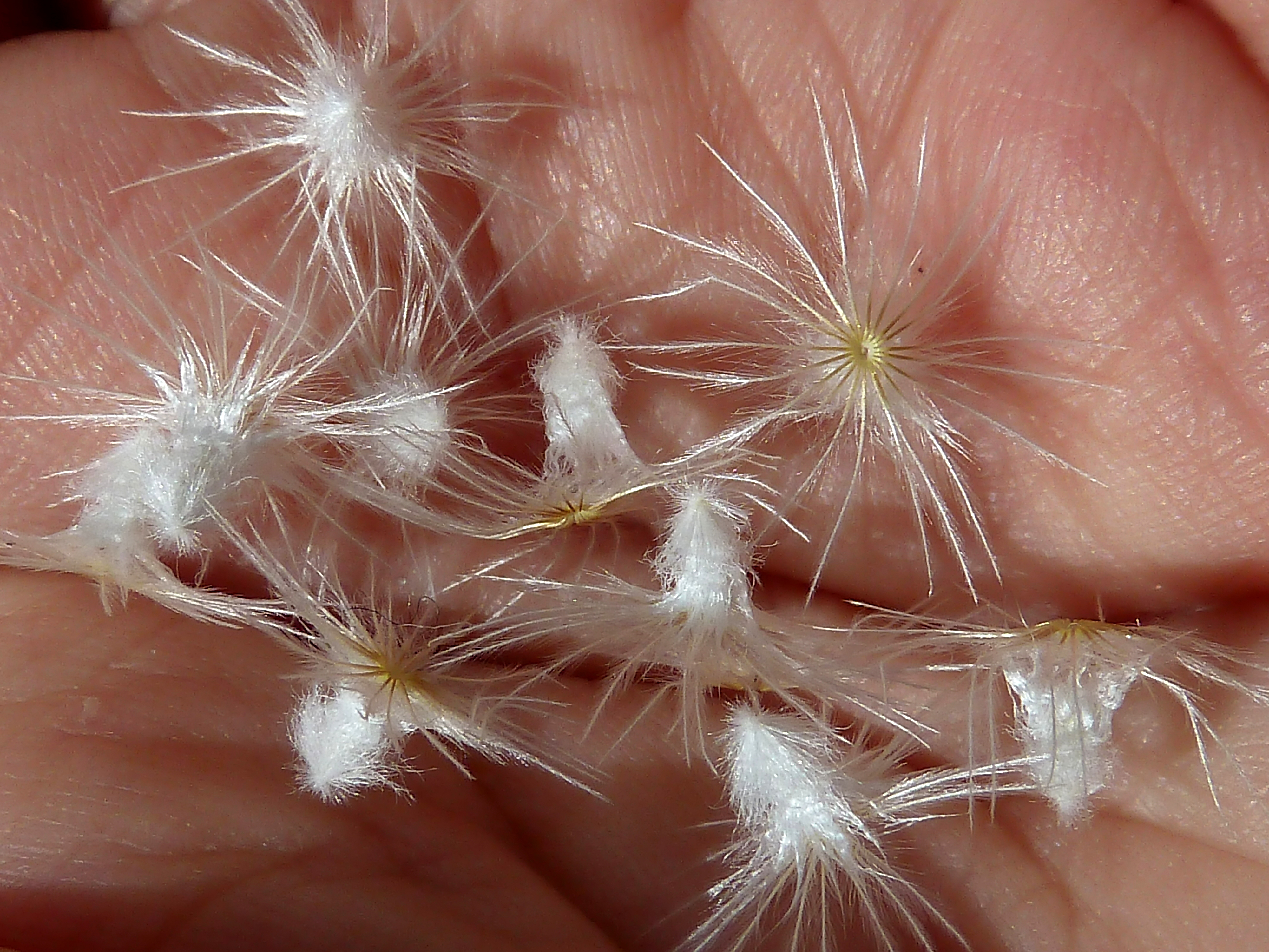 Atractylis cancellata (cancelillos, cardo enrejado,...) - Cipselas seríceas de vilano plumoso sueltas. circa Villa Suzana, Colonia Illicitana, Albatera (Provincia de Alicante, España).